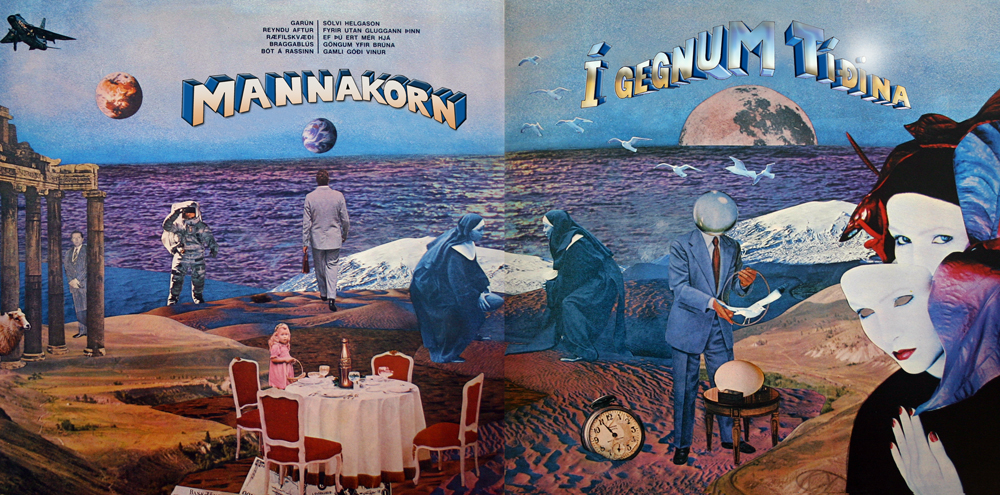 Höfundarréttur